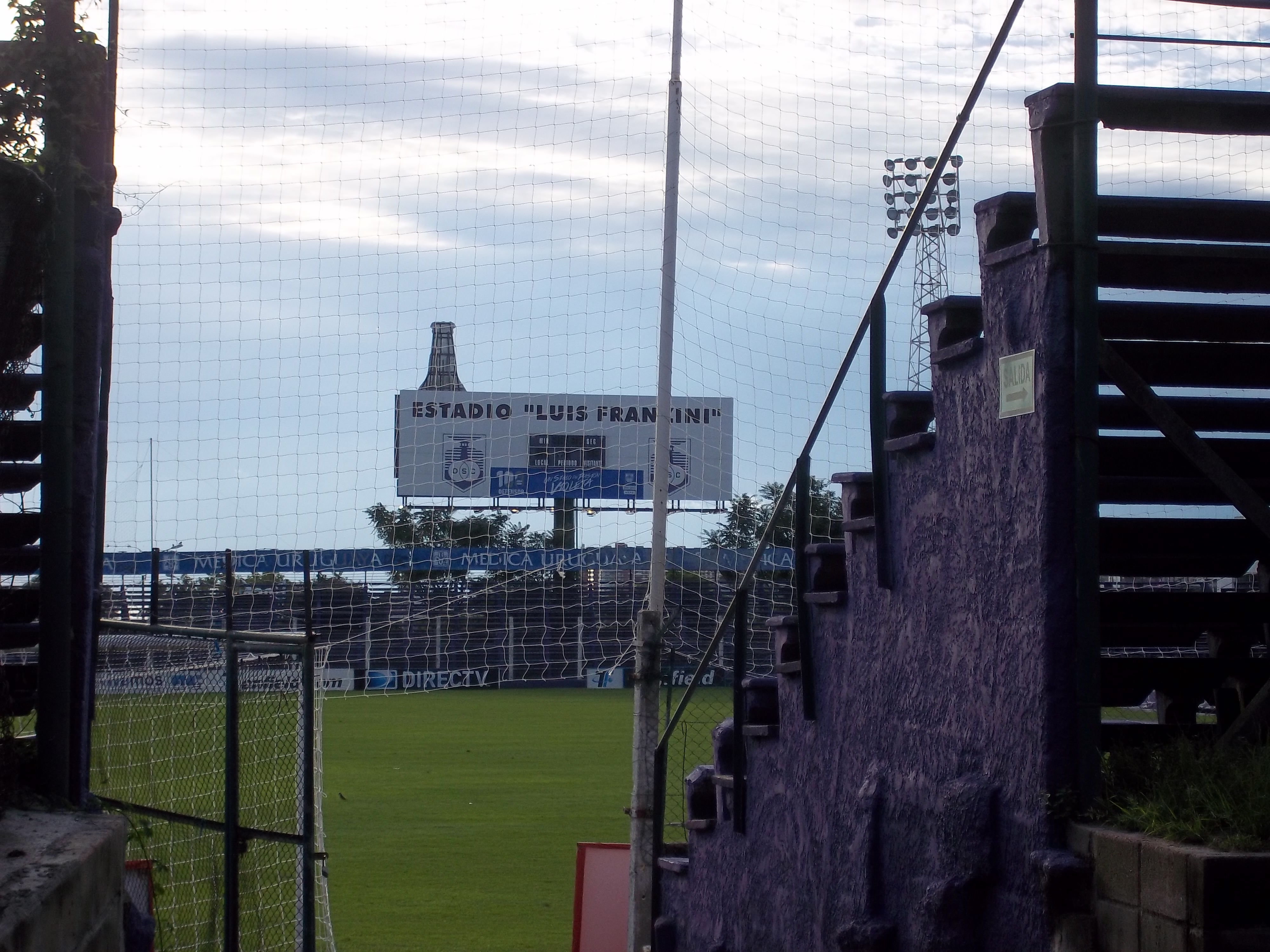 Acceso por la Puerta 2 del Estadio Luis Franzini, de Defensor SP.